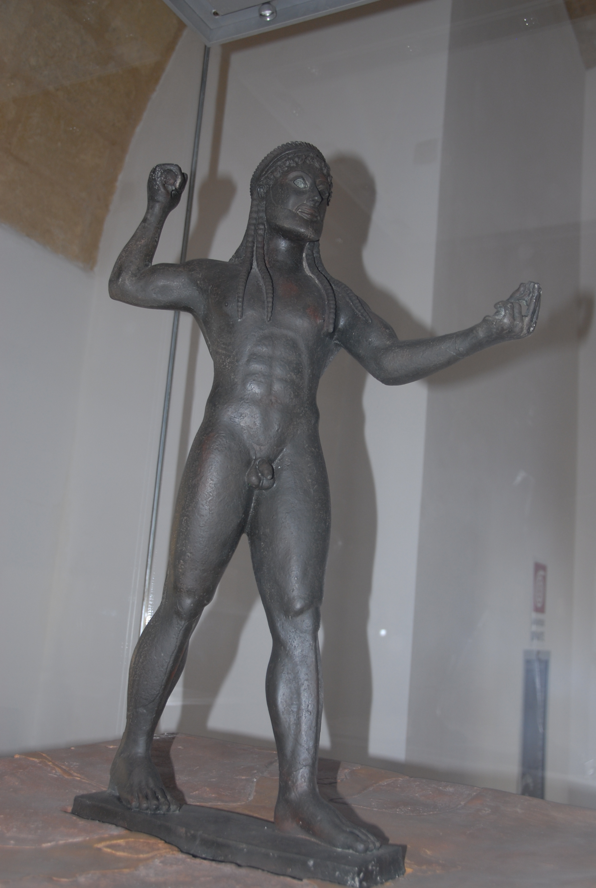 ugento